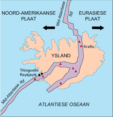 Deur Gebruiker:Laurens geskep vanaf Engelse voorbeeld en hiermee onder GFDL vrygestel.